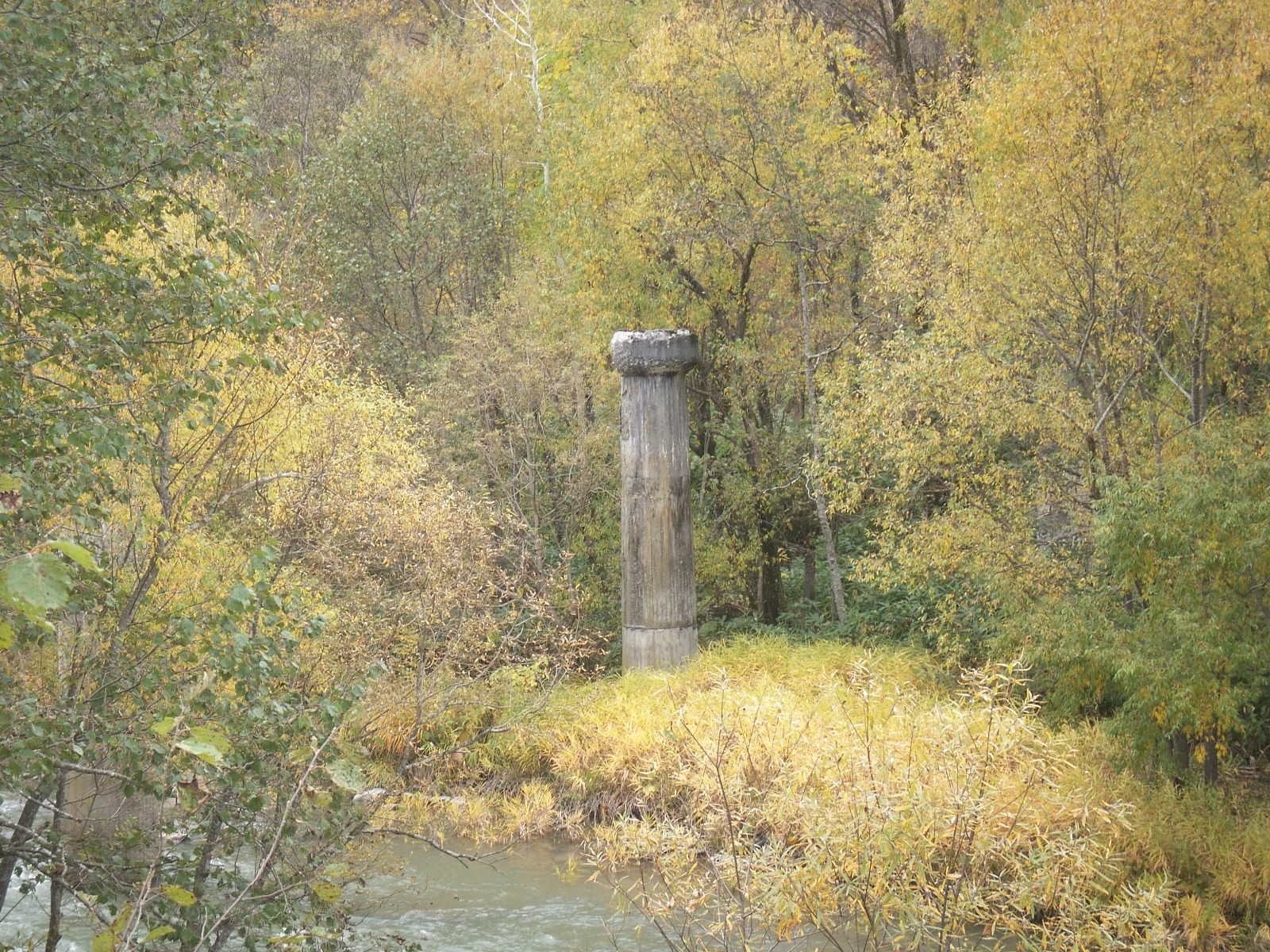 芦別森林鉄道の遺構